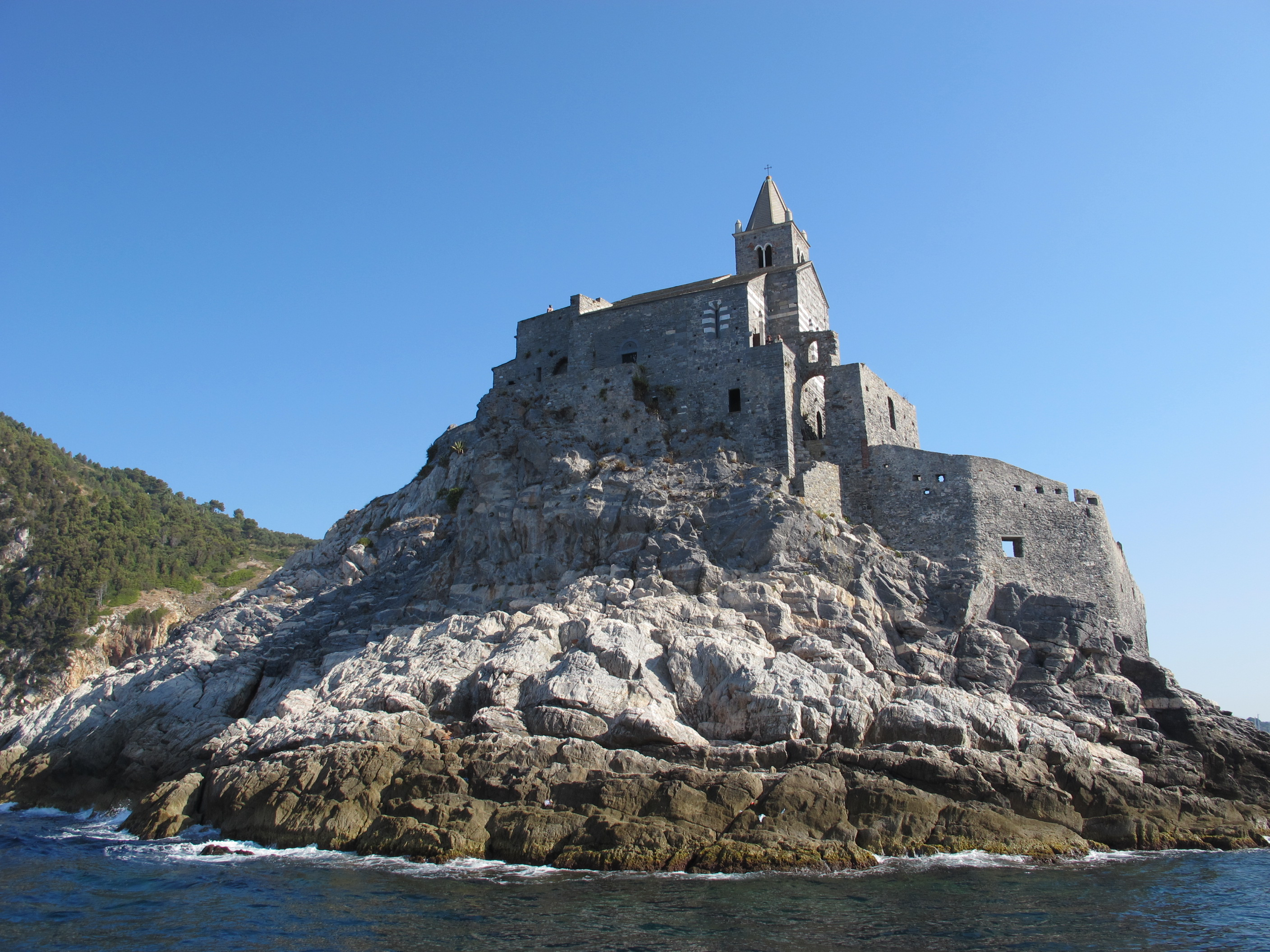 Portovenere, santo pietro